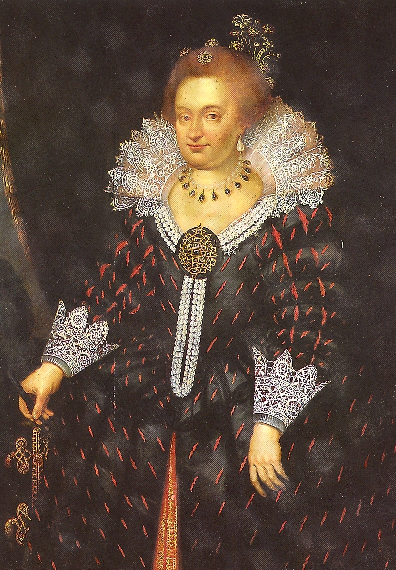 Éléonore de Bourbon, Ehefrau von Philipp Wilhelm